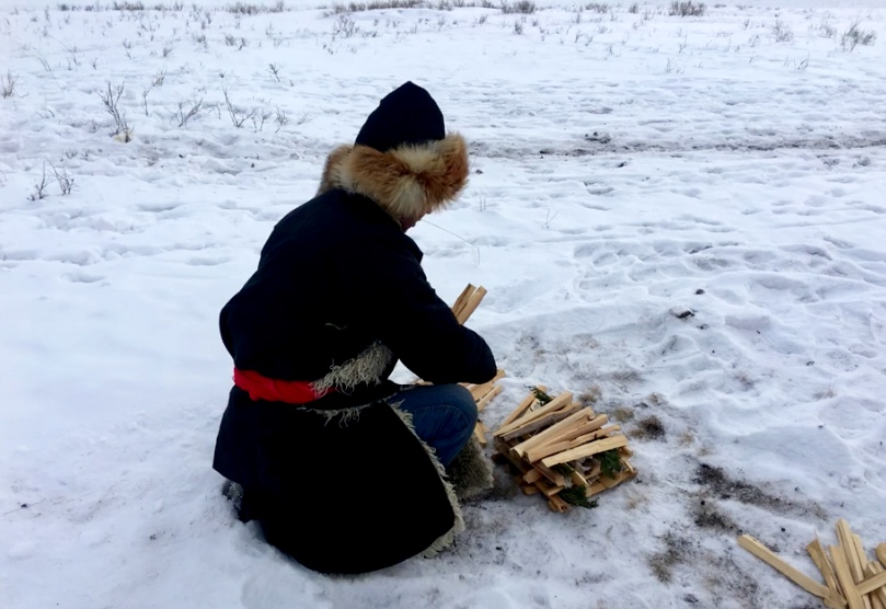 Тувинский новый год Шагаа